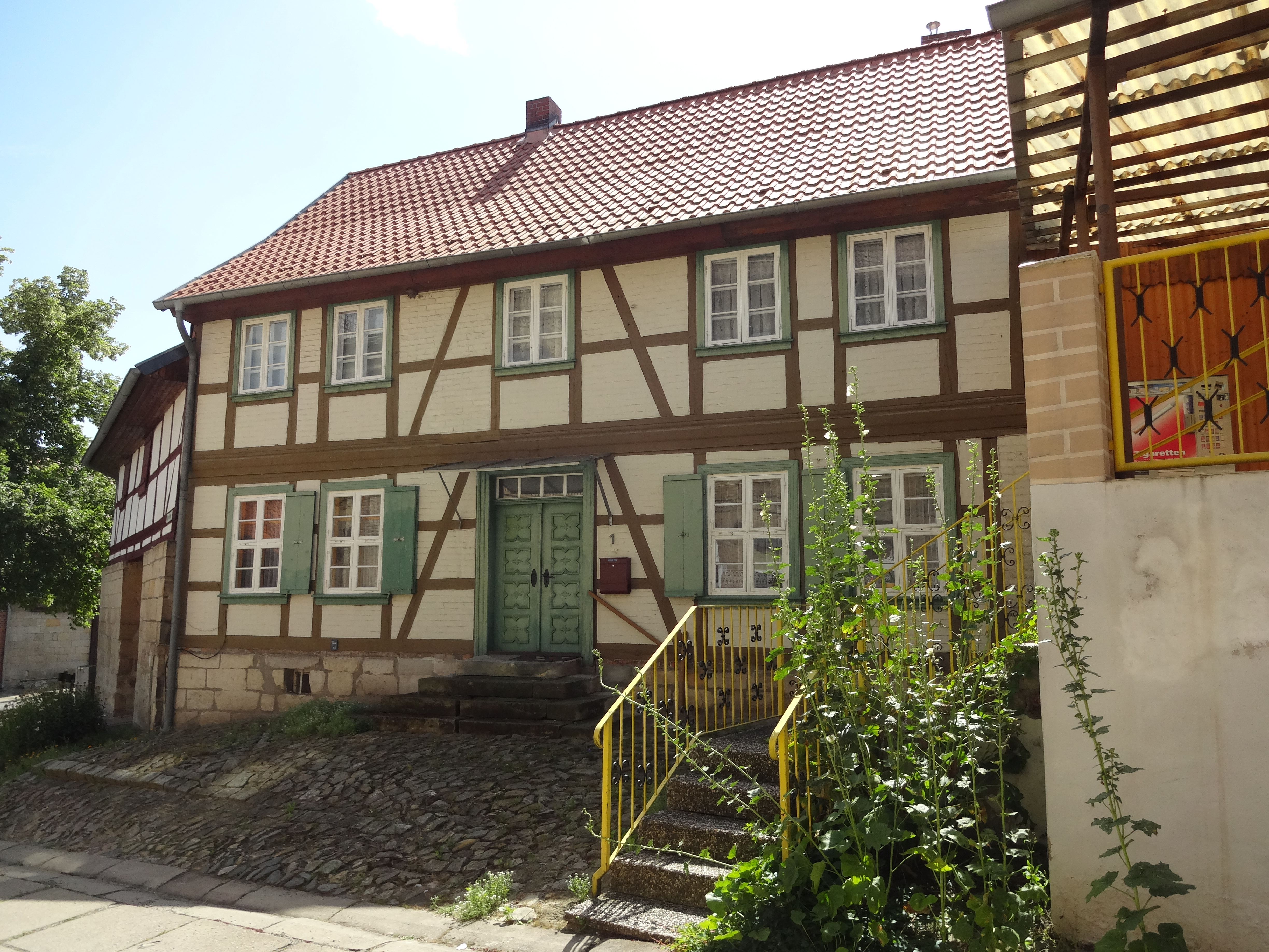 denkmalgeschütztes Bauernhaus in der Hohen Straße 1 in Börnecke, Ortsteil von Blankenburg/Harz